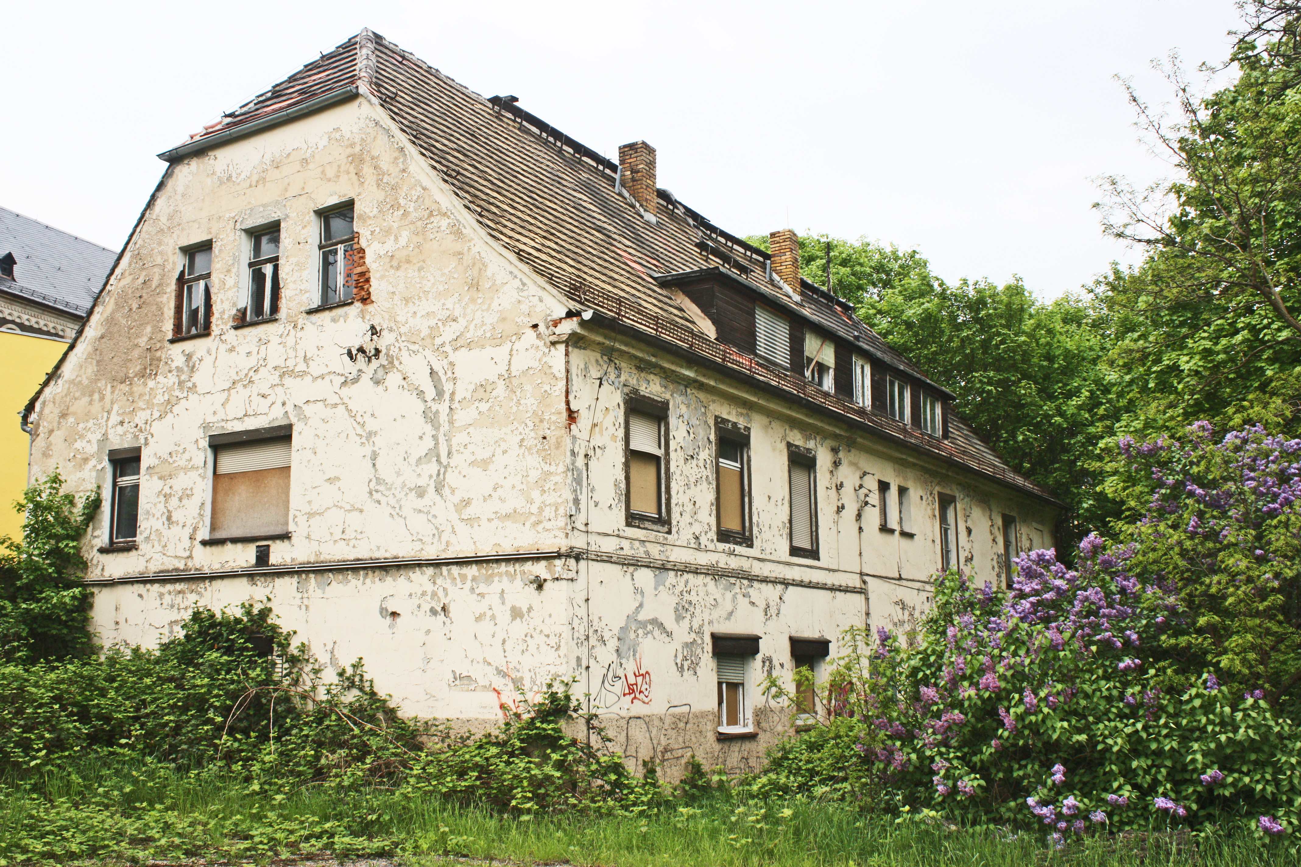 Schloss Kleinzschocher, heutiger Zustand (2013)